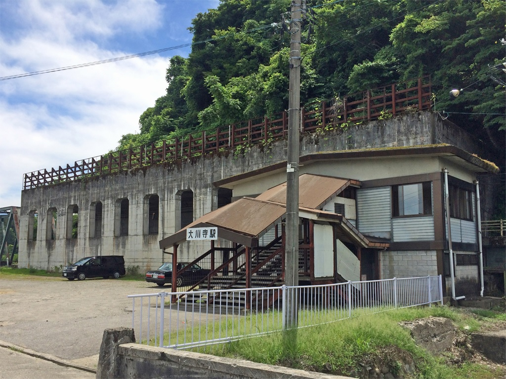 富山地方鉄道上滝線 大川寺駅